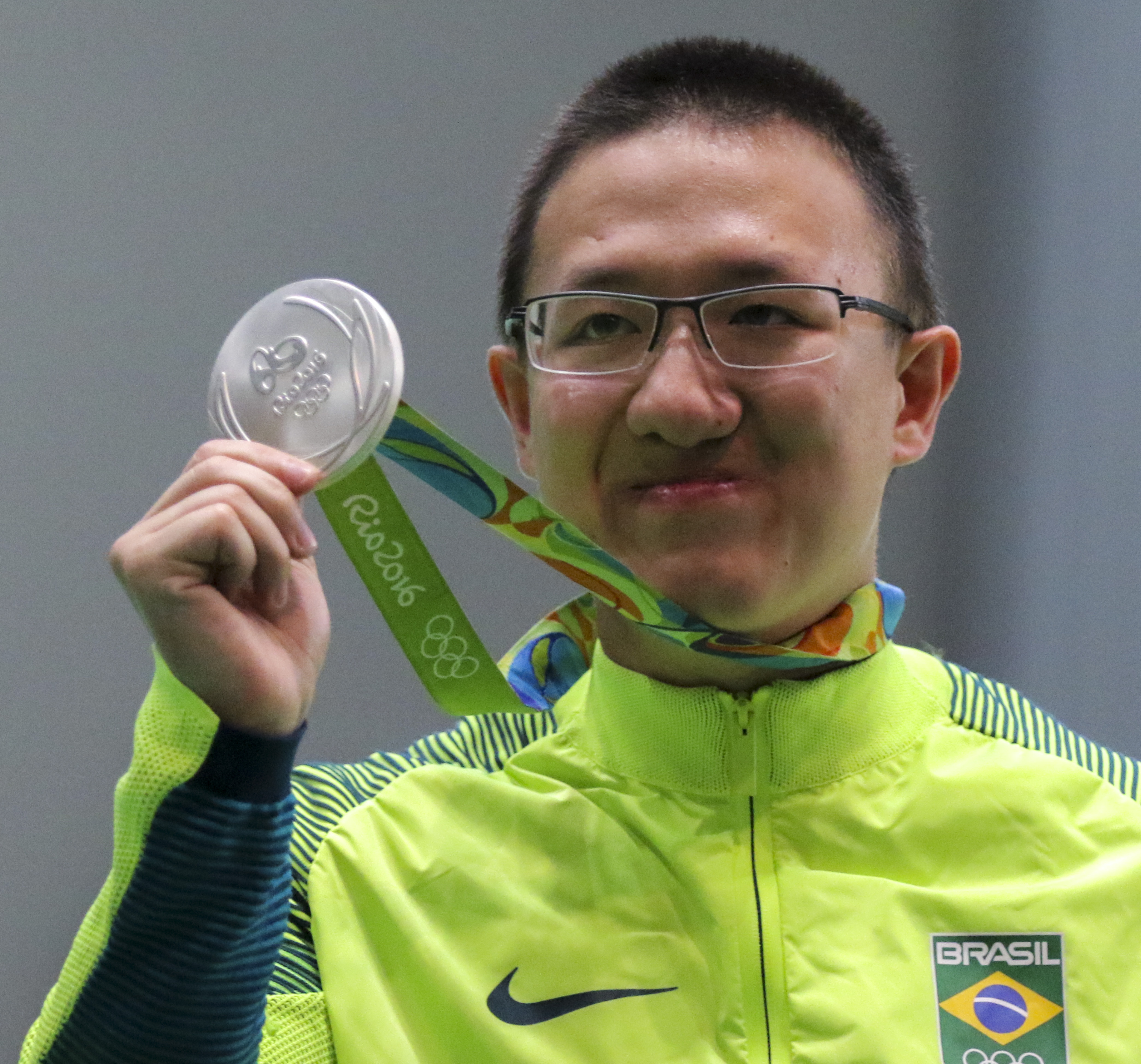 Brasileiro Felipe Wu comemora a conquista da medalha de prata na prova de pistola de ar 10m nos Jogos Olímpicos Rio 2016. Foto: Danilo Borges/Brasil2016.gov.br